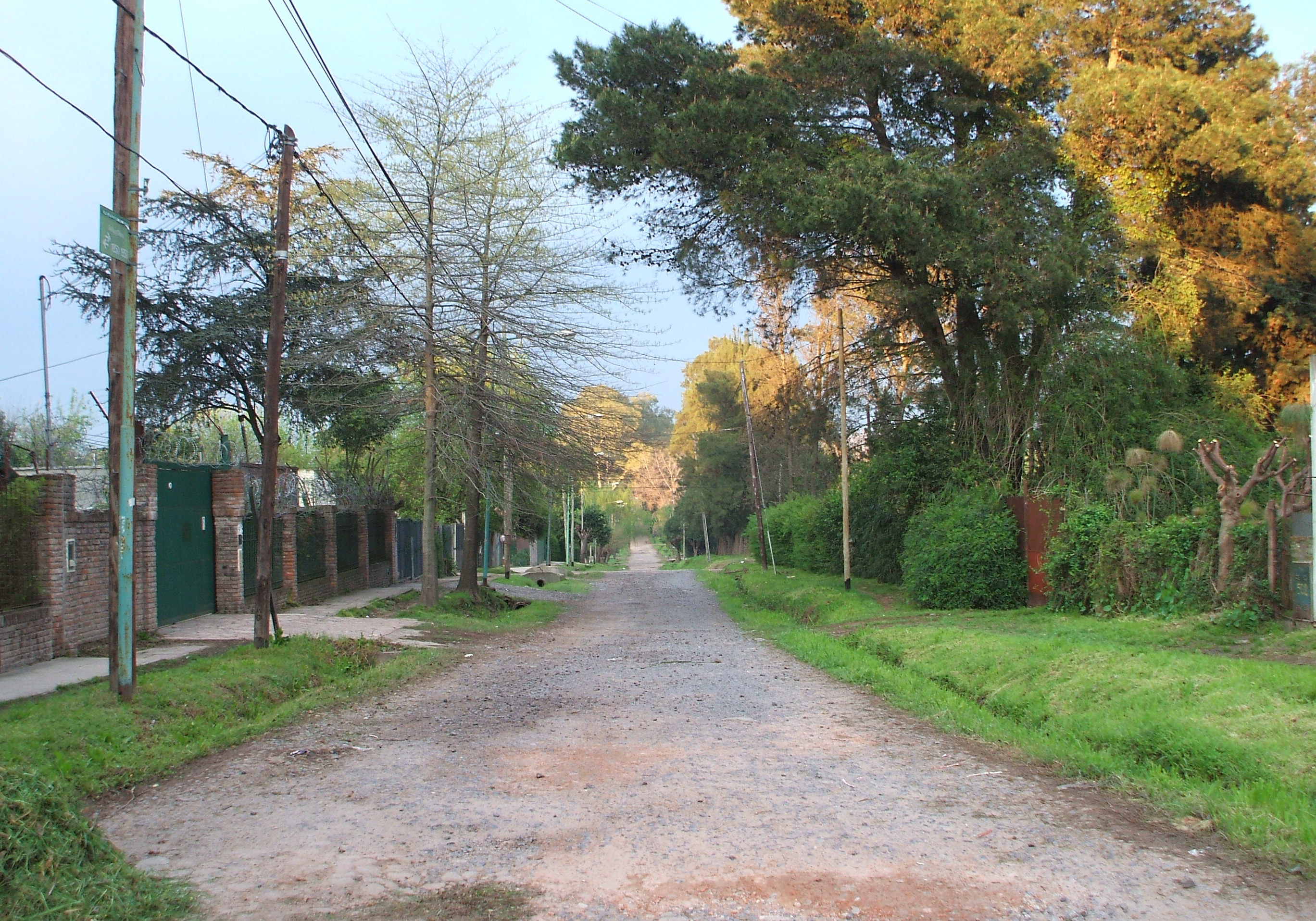 Calle Gelly Obes, El Talar, Buenos Aires